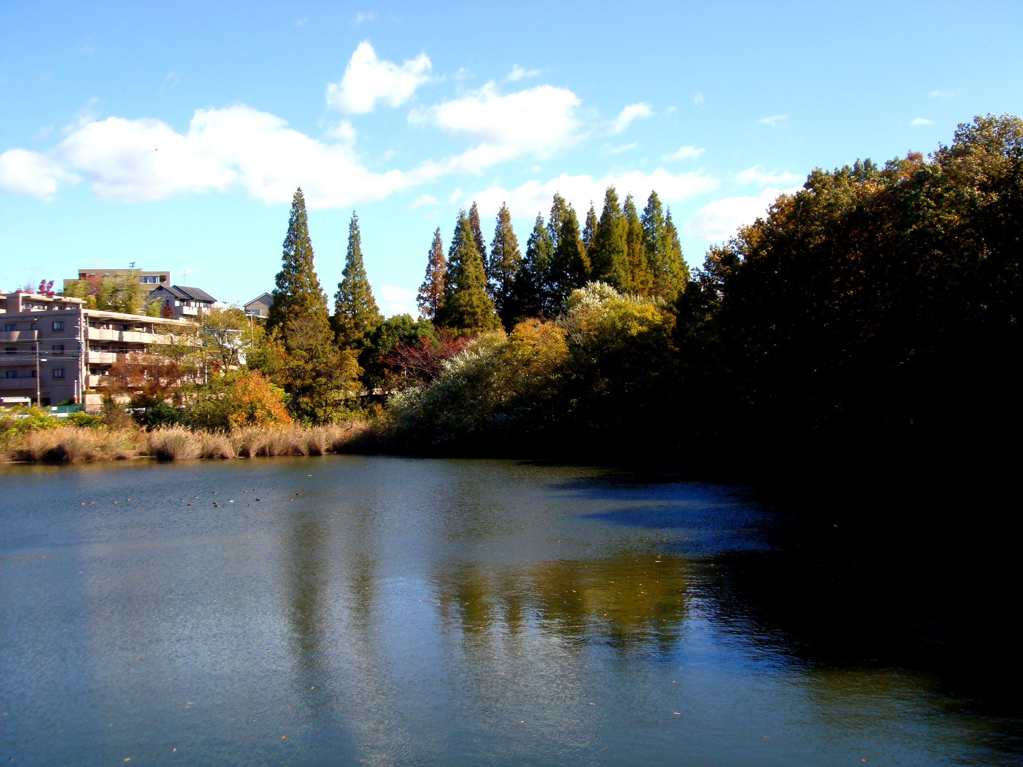 茶屋ケ坂池 Chayagasaka pond